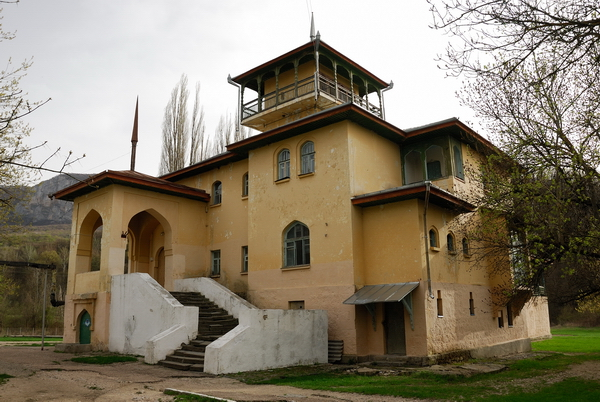 Комплекс колишнього Юсуповського палацу